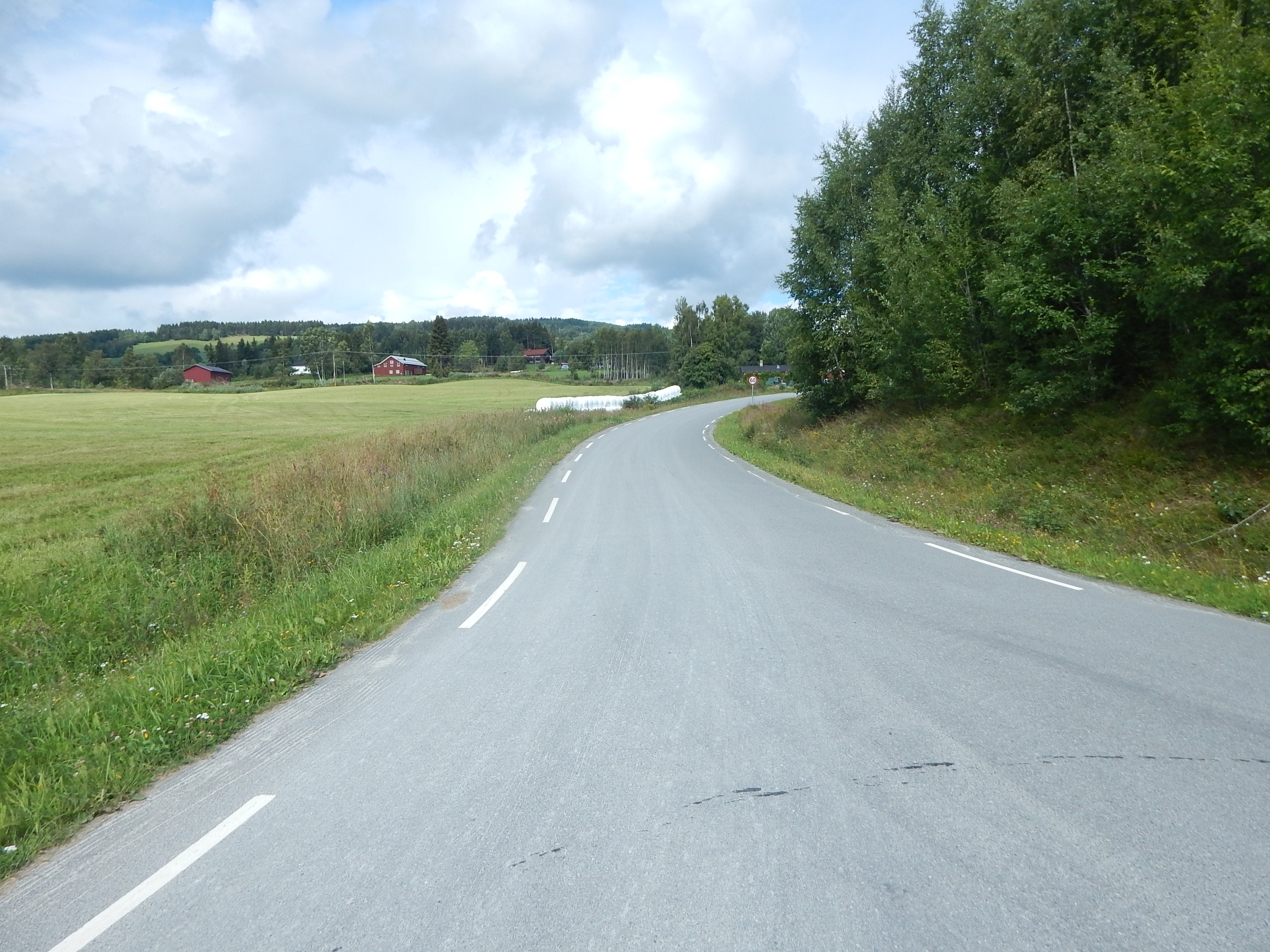 Sørenden av Yksetvegen (fylkesvei 1724, tidl. 57)